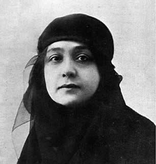 Huda Sha'arawi (o Hoda Shaarawi) (en árabe: هدى شعراوي , Hudá Sha‘arāwī) (Menia, Egipto, 23 de junio de 1879 – El Cairo, 12 de diciembre de 1947) fue una de las pioneras del movimiento feminista egipcio y árabe,1​2​ nacionalista y fundadora de la Unión Feminista Egipcia.